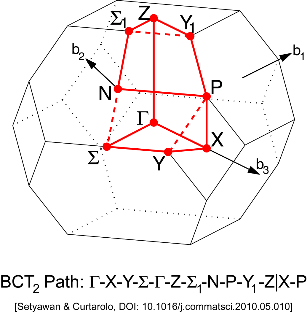 Curtarolo, consortium